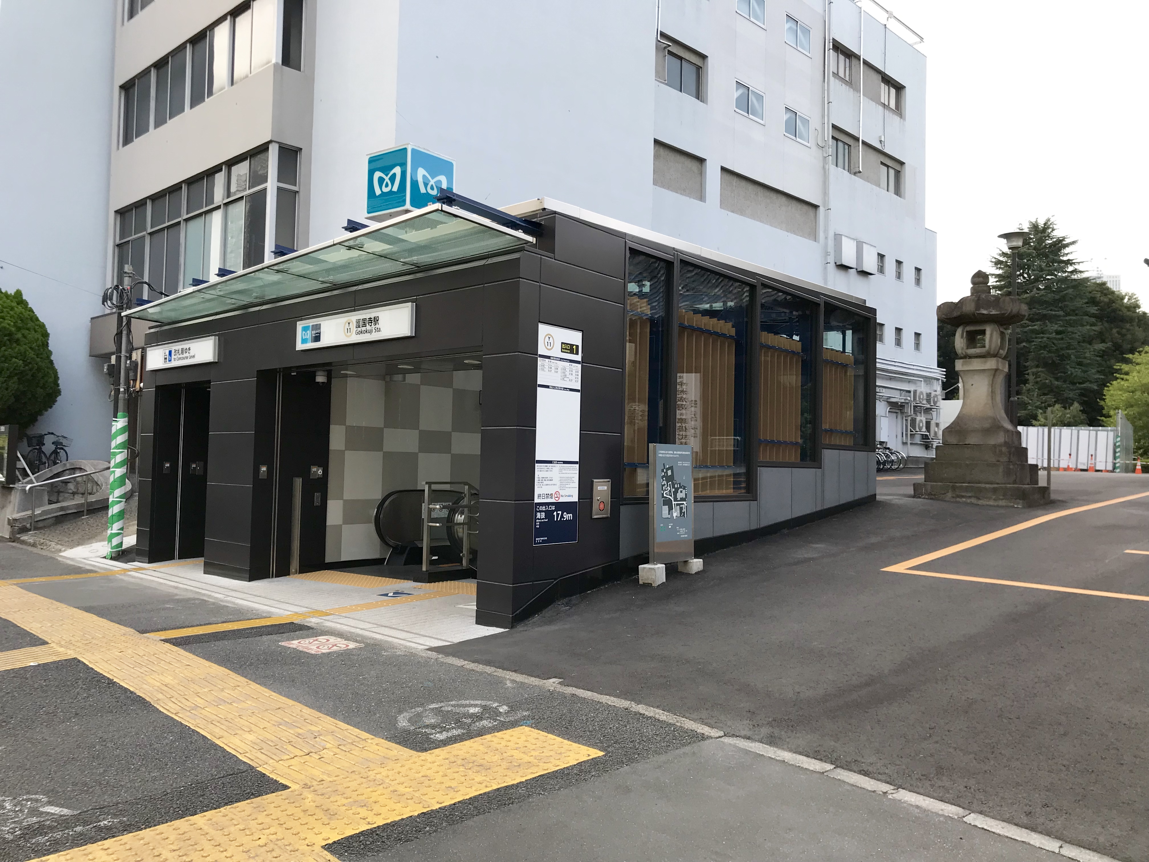 東京メトロ有楽町線護国寺駅1番出入口